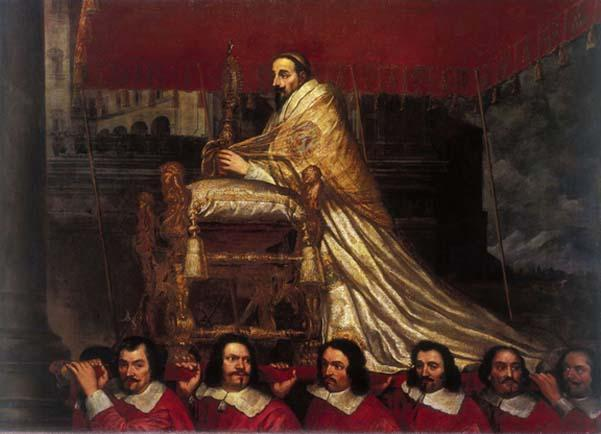 Giovanni Maria Morandi, Alessandro VII alla processione del Corpus Domini, Musèe des Beaux-Arts, Nacy